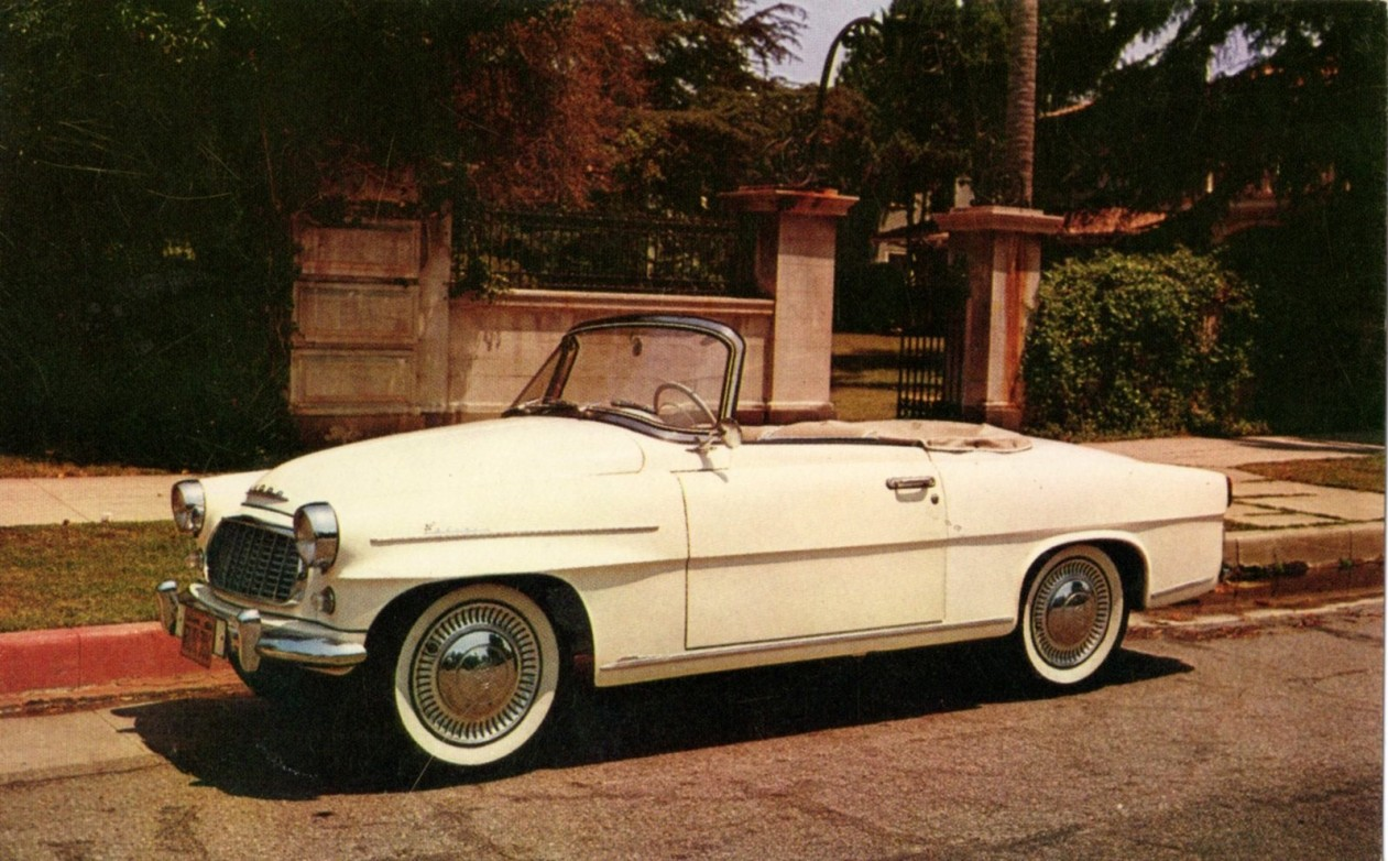 Skoda Felicia Convertible, 1960